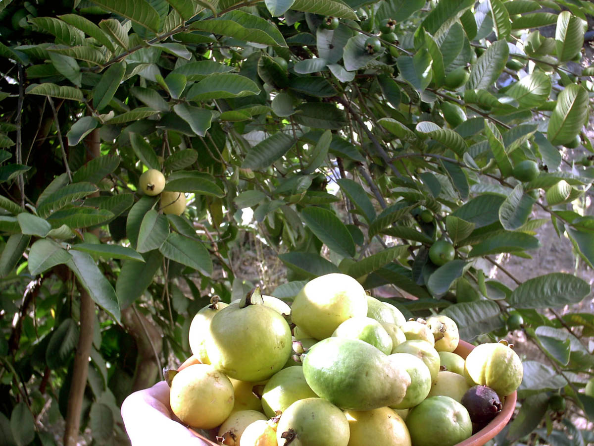 Guayaba Harvest in Ensenada Baja California, Mexiko Wie man sieht gibts auch andere farben als Gelb (Dunkelrot) und verschiedene Formen, die meisten sind recht perfekt Sphärisch. Diese waren Reif im Januar. Selbst aufgenommen unf GFDLTogo 07:07, 8. Aug 2004 (CEST)